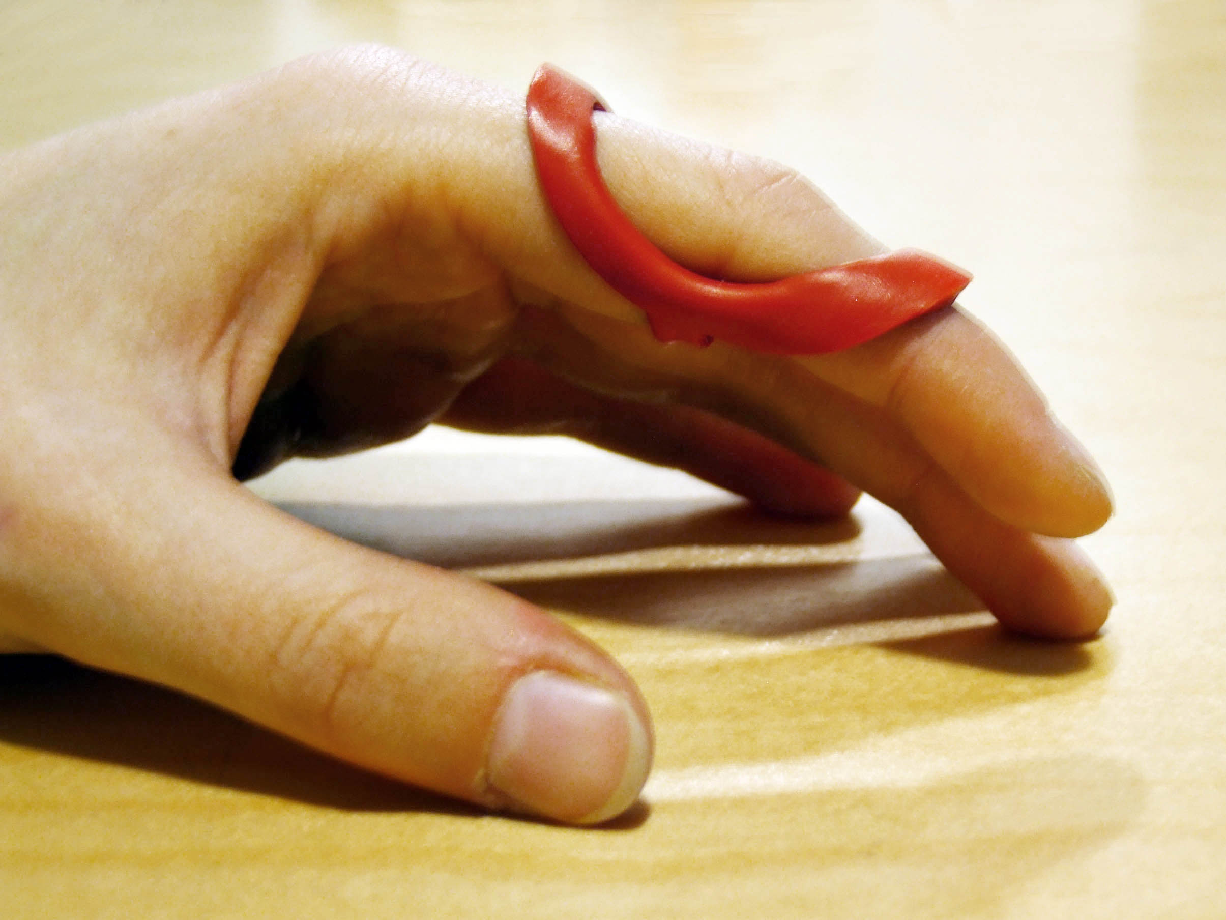 Schwanenhalsring oder auch Schwanenhalsschiene zur Korrektur der Fehlstellung bei Schwanenhalsdeformität.